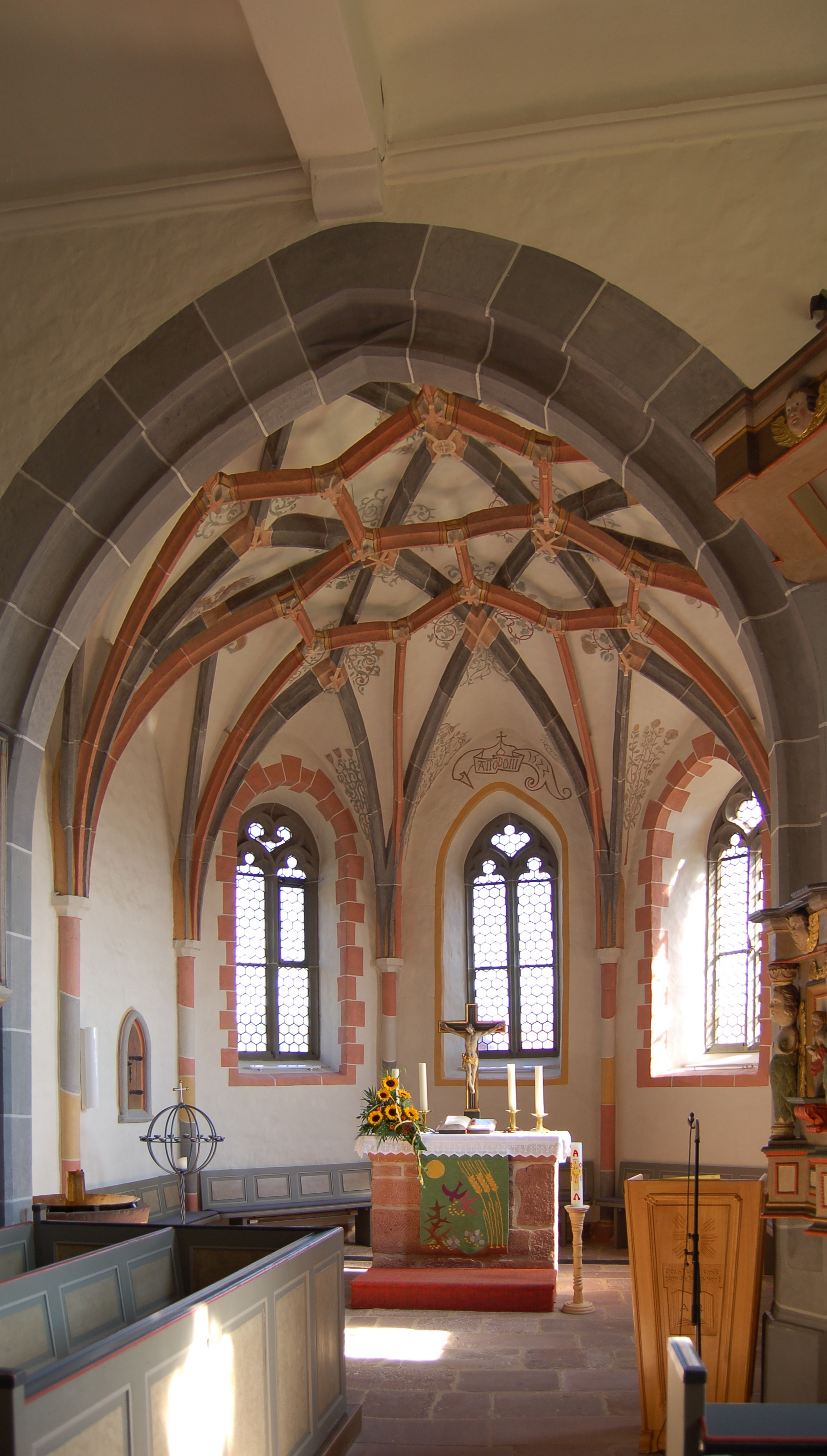 Dieses Foto entstand im Rahmen des Projekts Wiki Loves Monuments Mittelhessen, das aus dem Community-Projektbudget von Wikimedia Deutschland e. V. gefördert wurde.